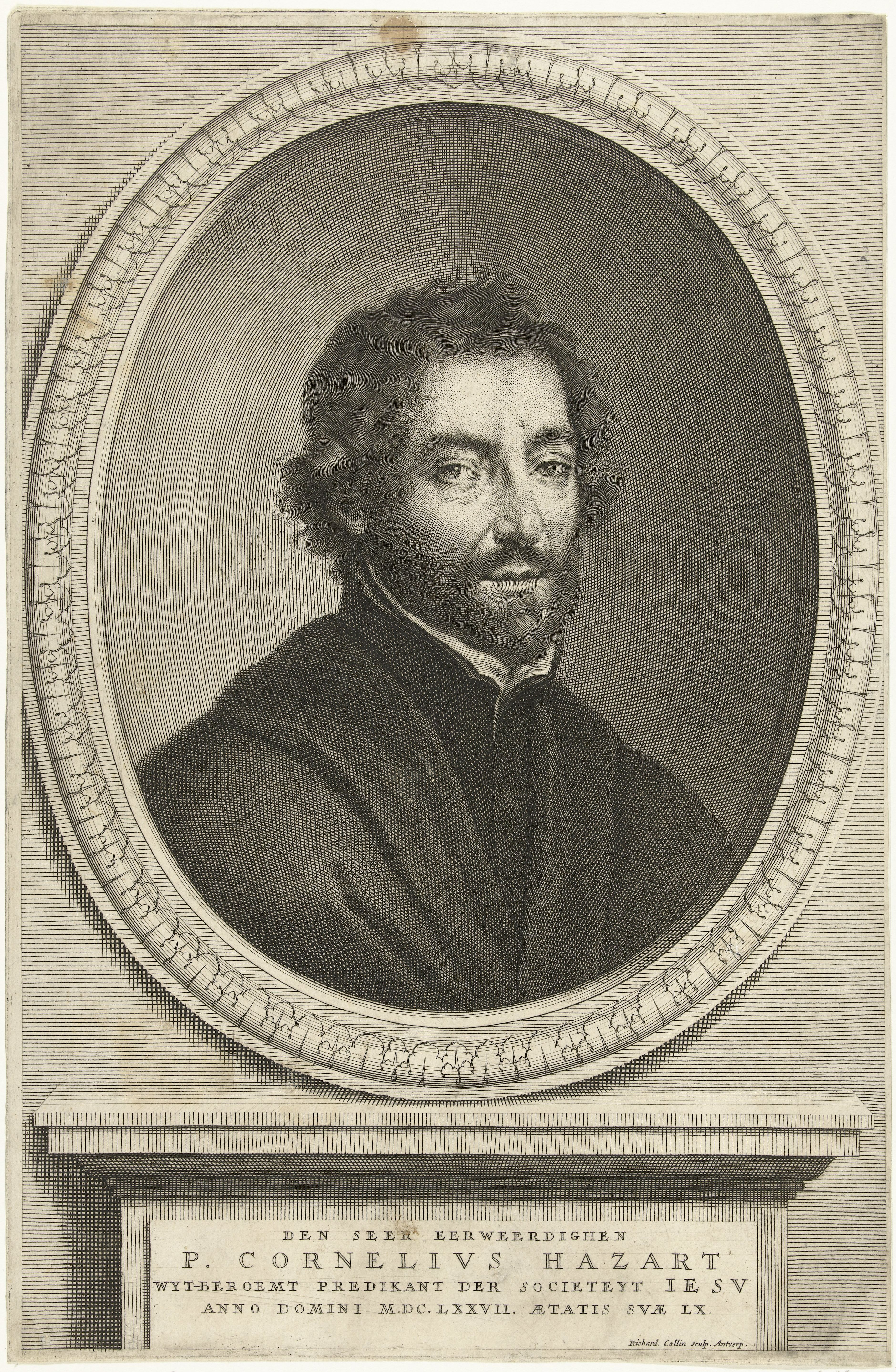 Borstbeeld van de jezuïet Cornelius Hazart, in ovaal. Onder het portret zijn naam en levensdata in het Nederlands. Objectnummer RP-P-1906-2432